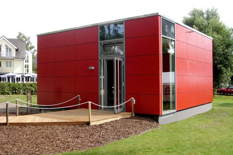 Die Infobox des Museums Ahrenshoops dokumentierte seit 2008 die Entstehung der Einrichtung.